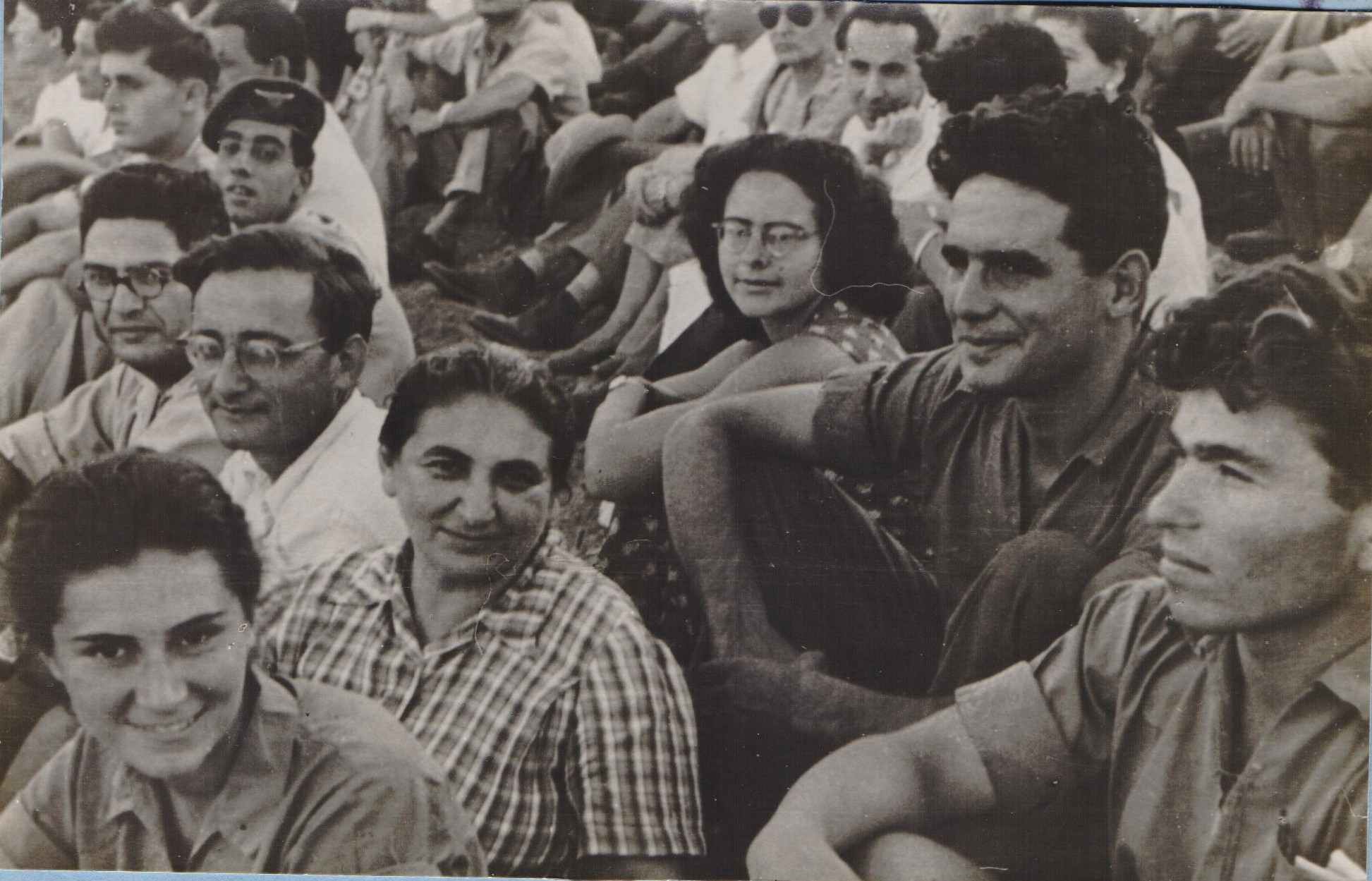 עדה יגורי, מזכירות חטיבת בני הקיבוצים עדה יגורי, אוסף נח ועדה יגורי, ארכיון יגור